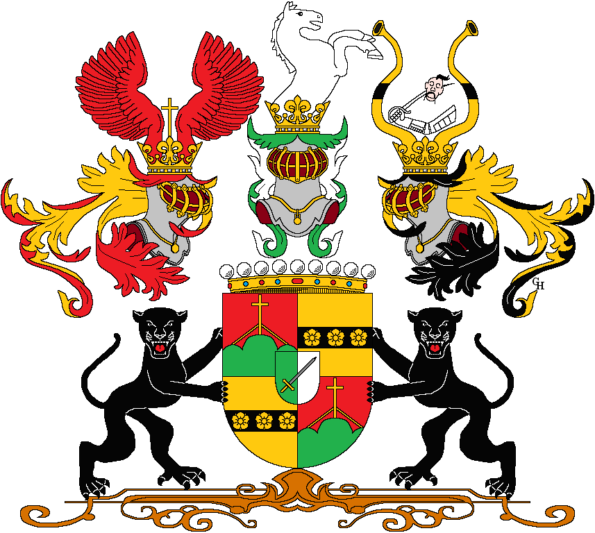 Wappen des österreichischen Beamten, Ministers und Ministerpräsidenten Richard Freiherrn von Bienerth (1863–1918), verliehen anlässlich seiner Erhebung in den österreichischen Grafenstand samt Namens- und Wappenvereinigung "Bienerth-Schmerling" 1915. Zeichnung von Gerd Hruška ( Für weitere Informationen zu dieser Standeserhebung siehe (